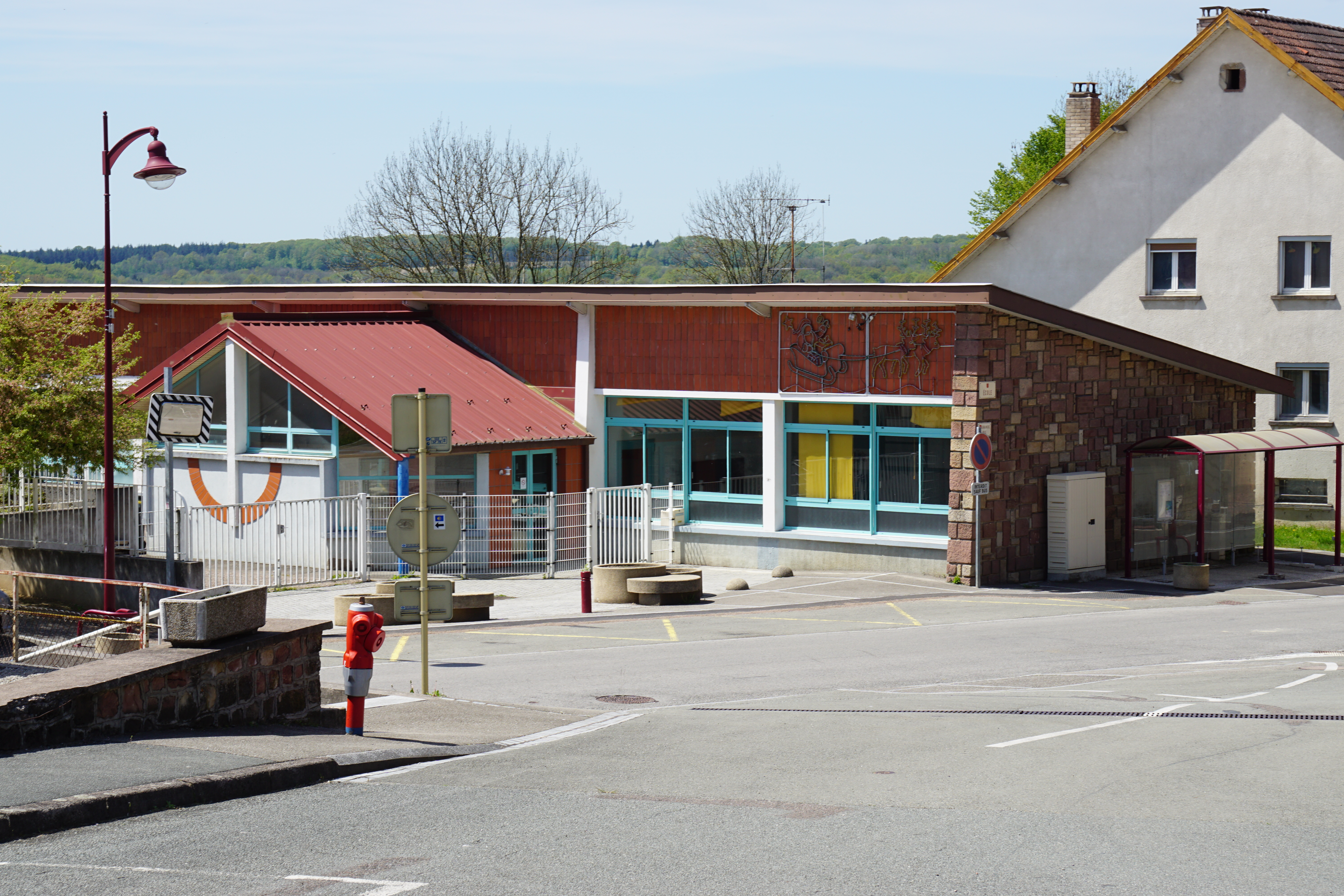 L'école de Granges-le-Bourg.